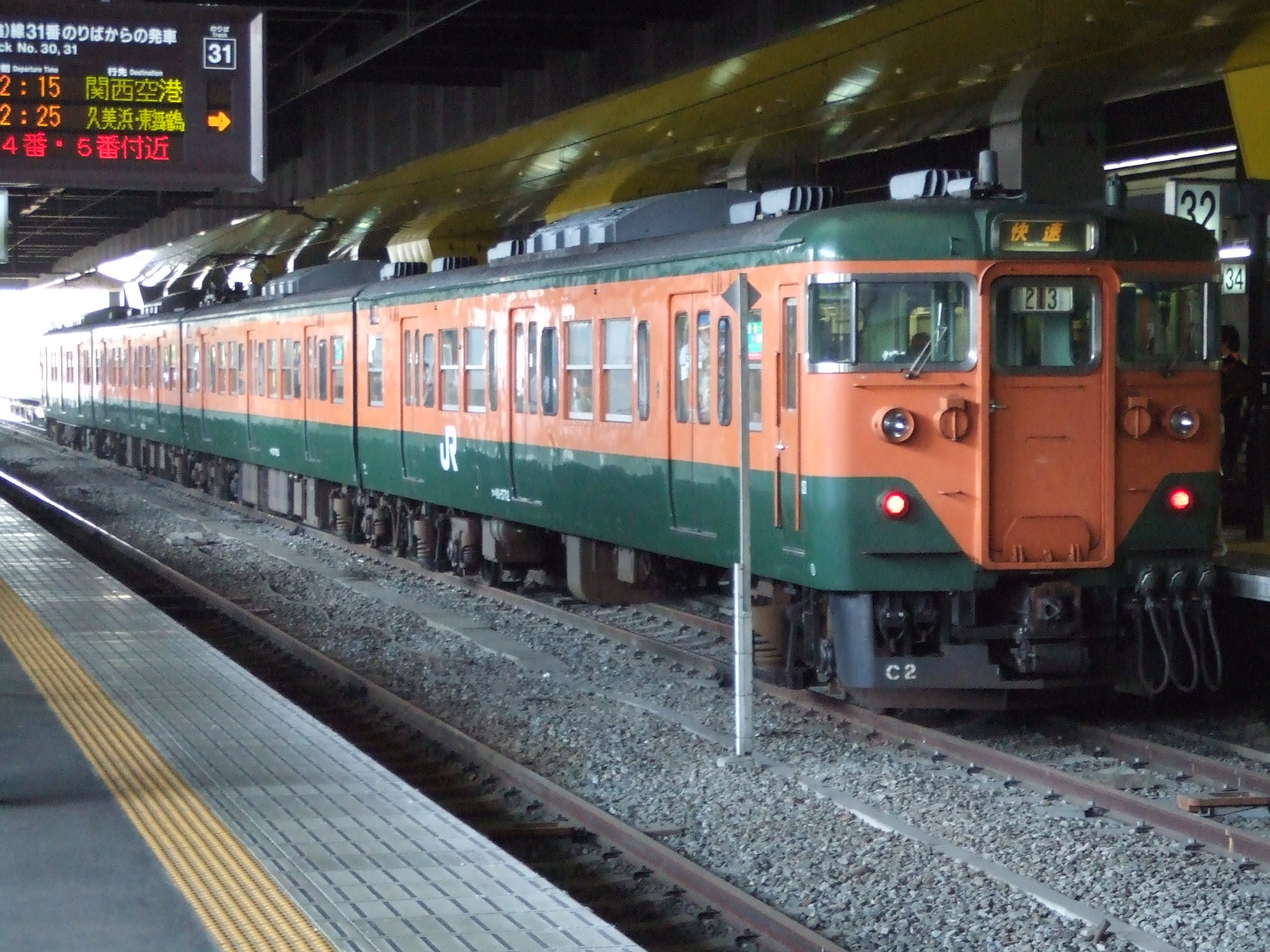 山陰本線 快速列車